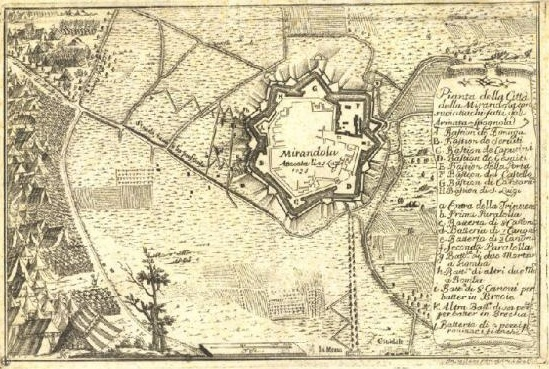 Pianta della città di Mirandola e suoi attacchi del 1735 A. Bastion de Bonaga B. Bastion de Serviti C. Bastion de Capucini D. Bastion de Gesuiti E. Bastion de la Porta F. Bastion del Castello G. Bastion di Cantarana H. Bastion di S. Luigi a. Entra della Trinciera b. Prima Parallela c. Batteria di 8 Cannoni d. Batteria di 7 Cannoni e. Batteria di 3 Cannoni f. Seconda Parallela g. Batteria di due Mortari a Bomba h. Batteria di altri due Mortari a Bomba i. Batteria di 8 Cannoni per batter in Breccia k. Altra Batteria di sei pezzi per batter in Breccia l. Batteria di 2 pezzi per rouinar i fianchi